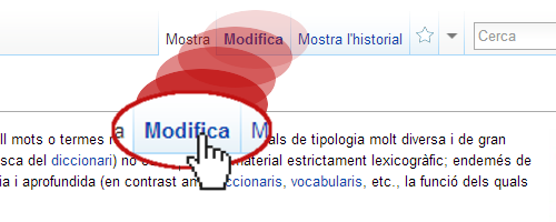 Ajuda per fer clic al botó "Modifica". Similar a File:Edit-this-page-large-ca.png però versió Vector.